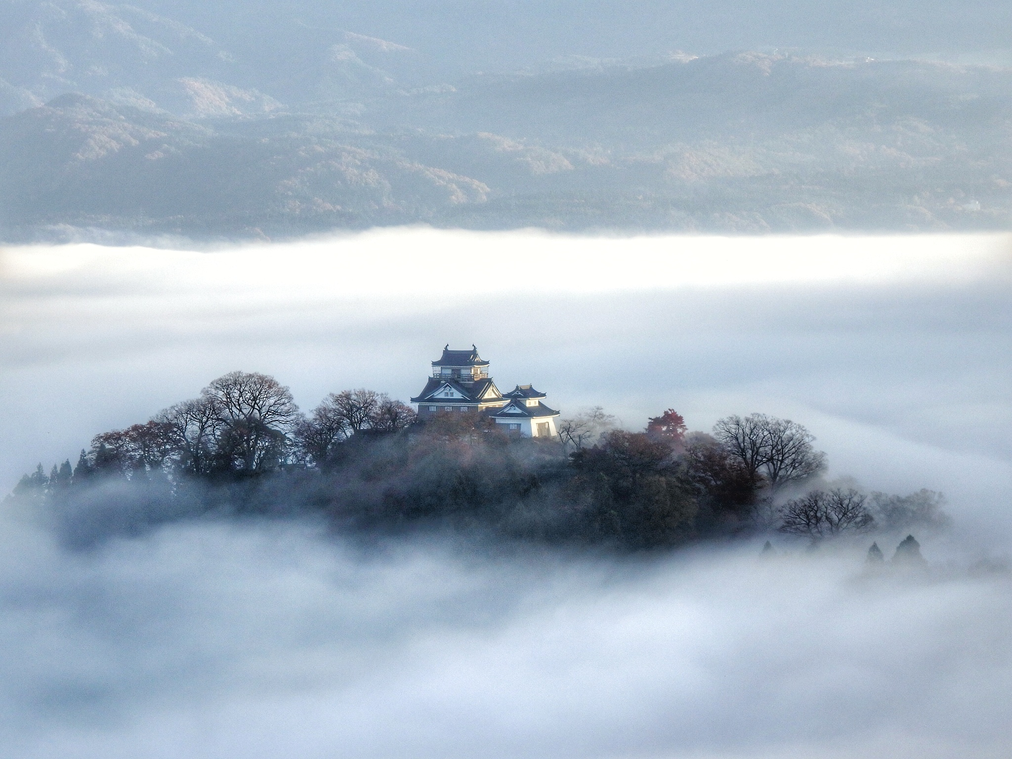 「天空の城」越前大野城（2019年11月23日 犬山展望スポットより撮影）